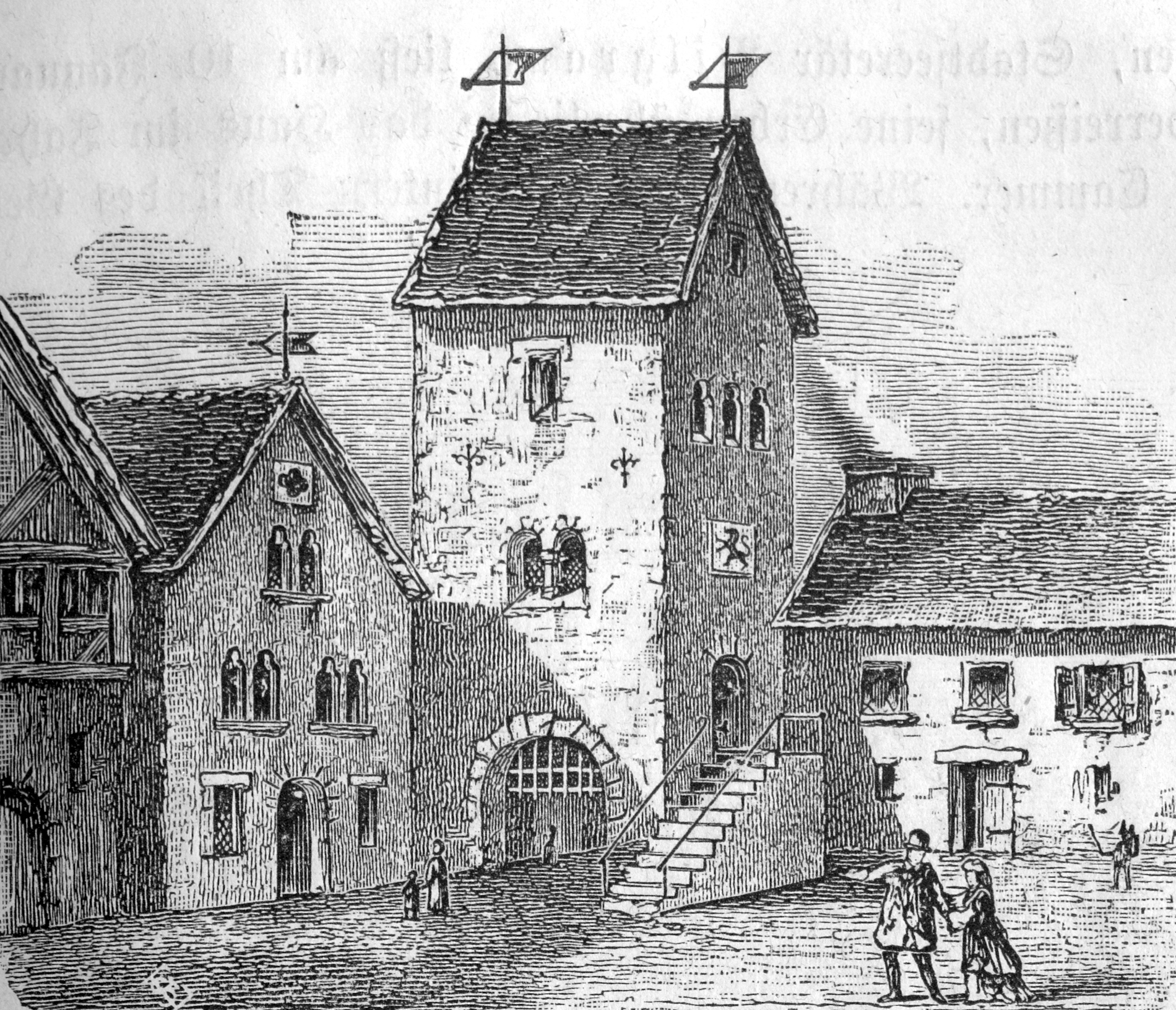 Braunschweig: Kupferstich von Beck. Das alte Löwentor vor 1639